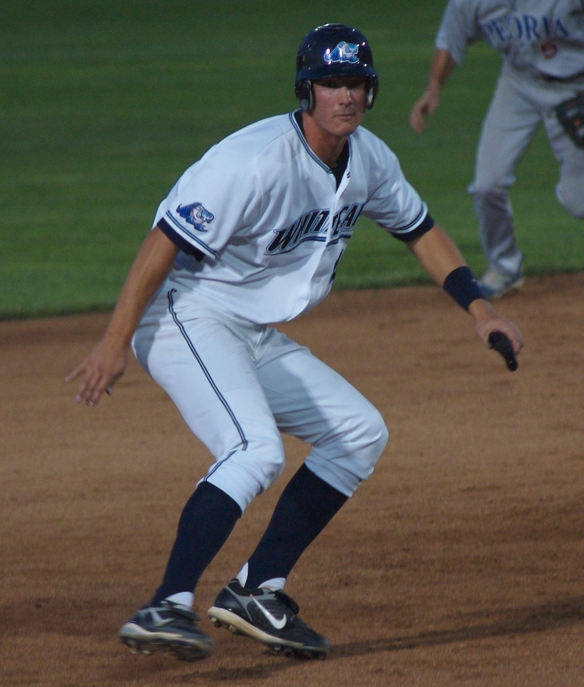 Ryan Strieby